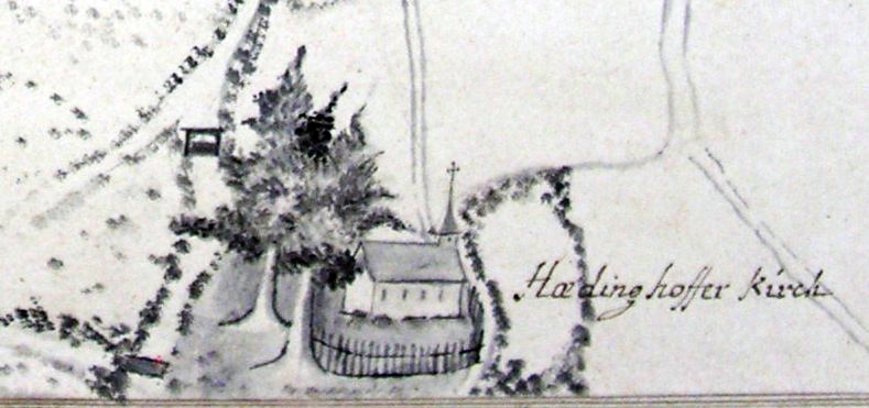 Lechenich, Heddinghoven. Kapelle St. Servatius, auf einer Flurkarte des Stiftes St. Aposteln in Köln von Mathias Emands, 1752